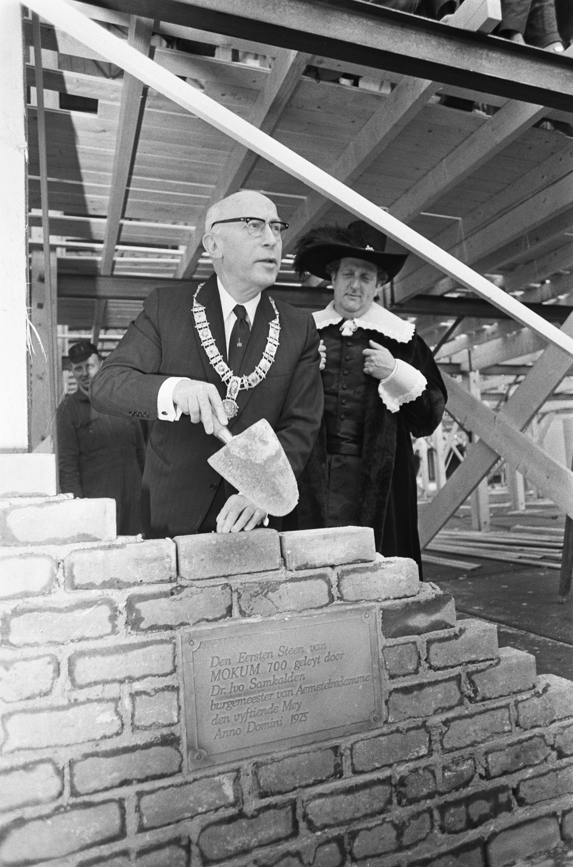 Collectie / Archief : Fotocollectie Anefo Reportage / Serie : Mokum 700 in de RAI te Amsterdam van 24-29 juni 1975 Beschrijving : Burgemeester Samkalden legt de eerste steen voor 'Mokum 700', rechts 'burgervaer' Kapelle Datum : 15 mei 1975 Locatie : Amsterdam, Noord-Holland Trefwoorden : burgemeesters, decors, kostuums, metselen, stenen Persoonsnaam : Kapelle, Mr. J.th., Samkalden, Ivo Fotograaf : Fotograaf Onbekend / Anefo Auteursrechthebbende : Nationaal Archief Materiaalsoort : Negatief (zwart/wit) Nummer archiefinventaris : bekijk toegang 2.24.01.05 Bestanddeelnummer : 927-9281